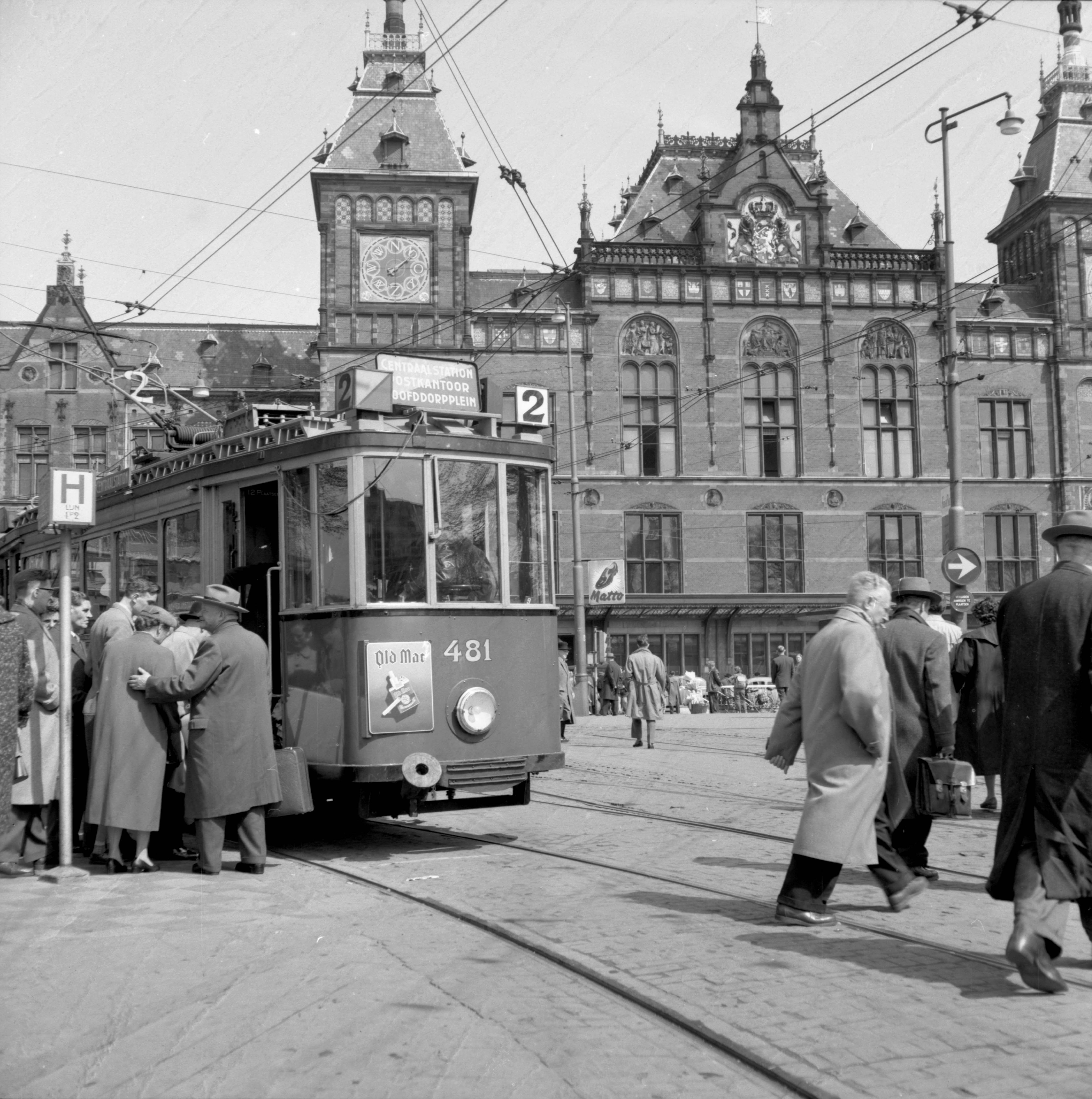 Afbeelding van een tram voor het N.S.-station Amsterdam C.S. te Amsterdam.